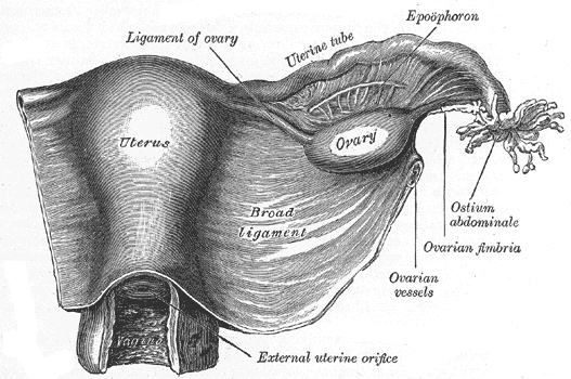 Vagusgruppe, Image:Gray1161.png, nachbearbeitet und Beschriftung modifiziert (Deutsch/german) von Marcus007